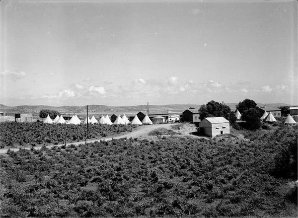 עין הים - מראה.